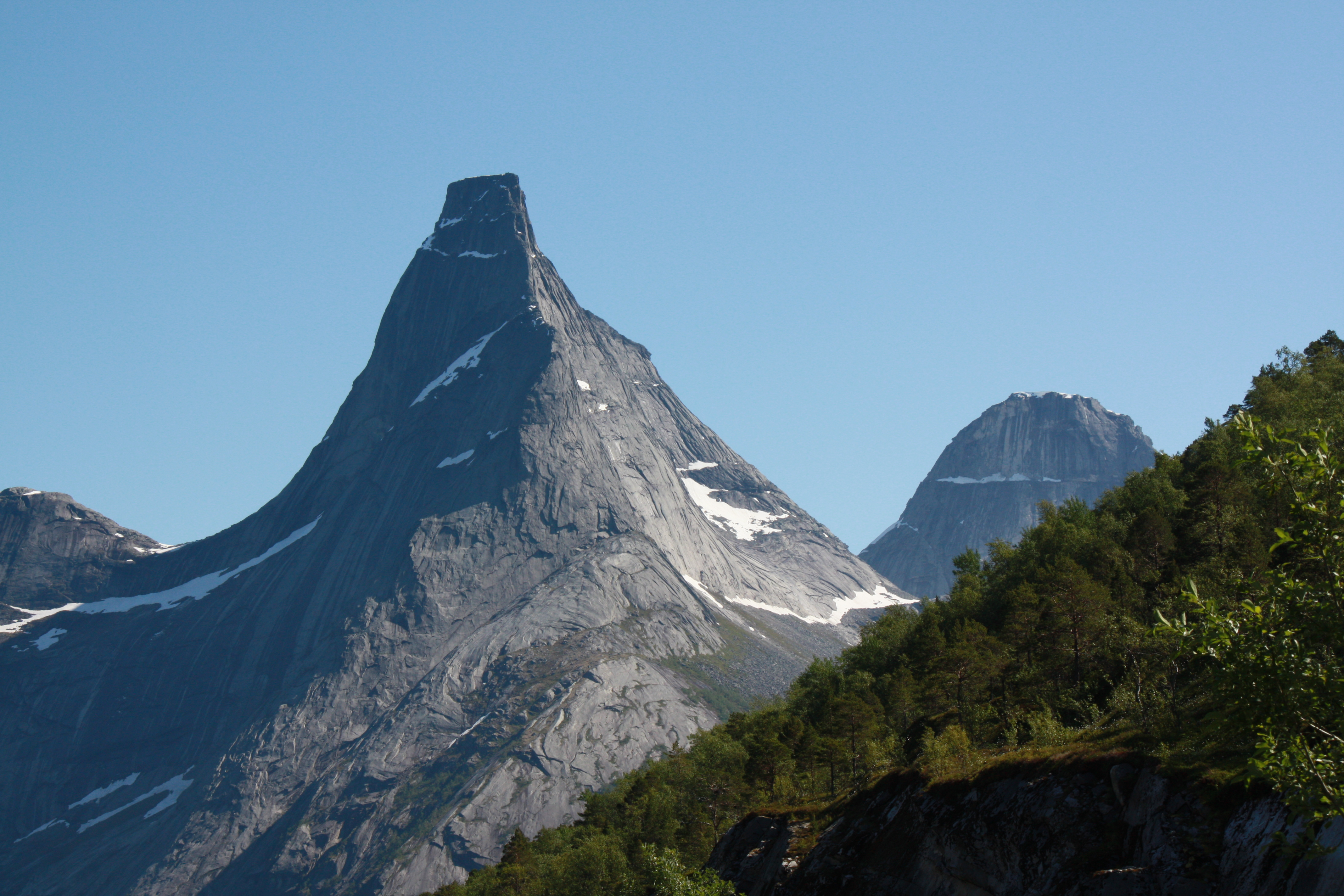 Norsk (bokmål): Stetind